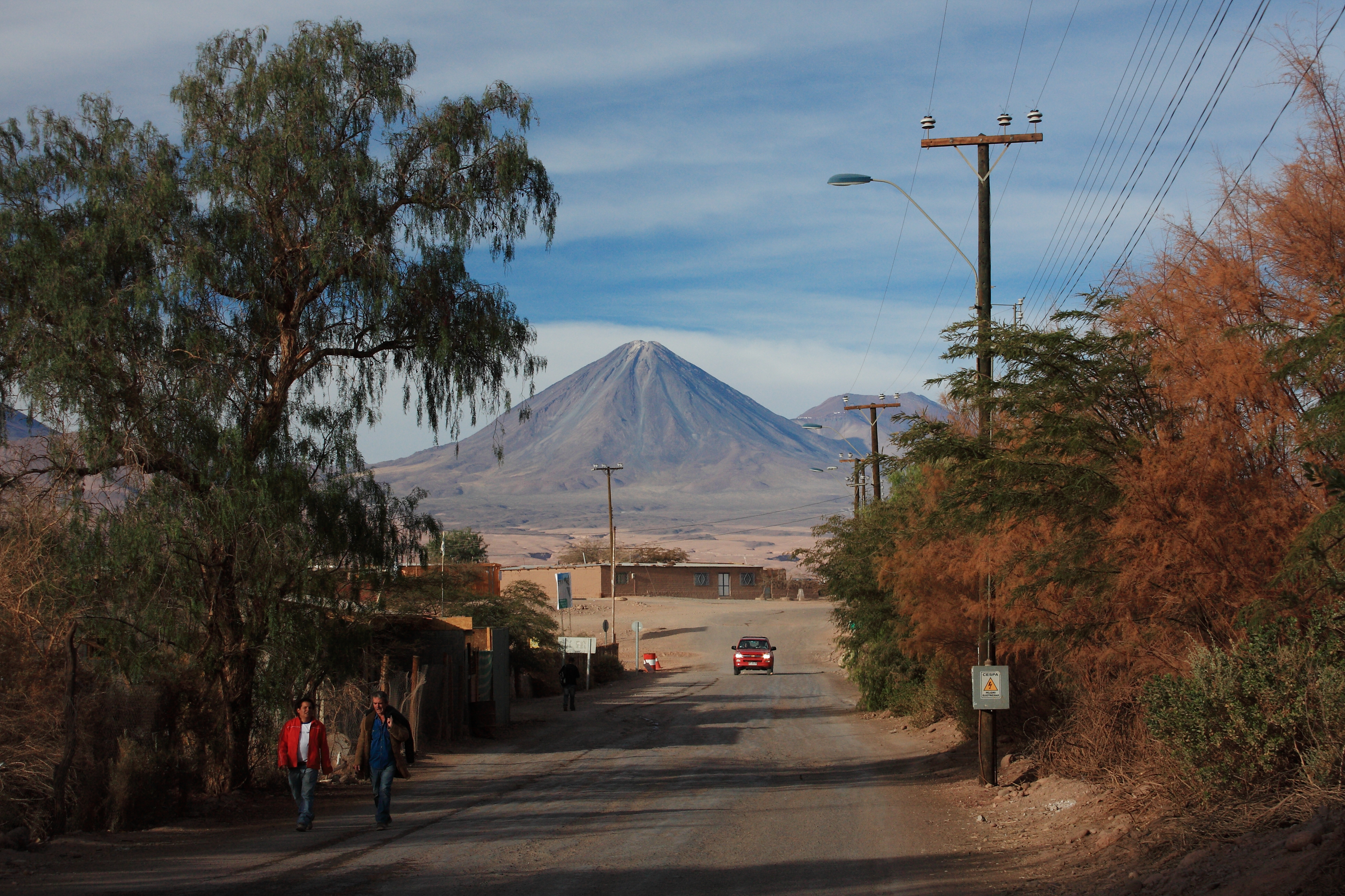 El Pueblo de San Pedro de Atacama rodeado de Volcanes y Desierto un oasis donde viven un poco mas de 2 mil personas.